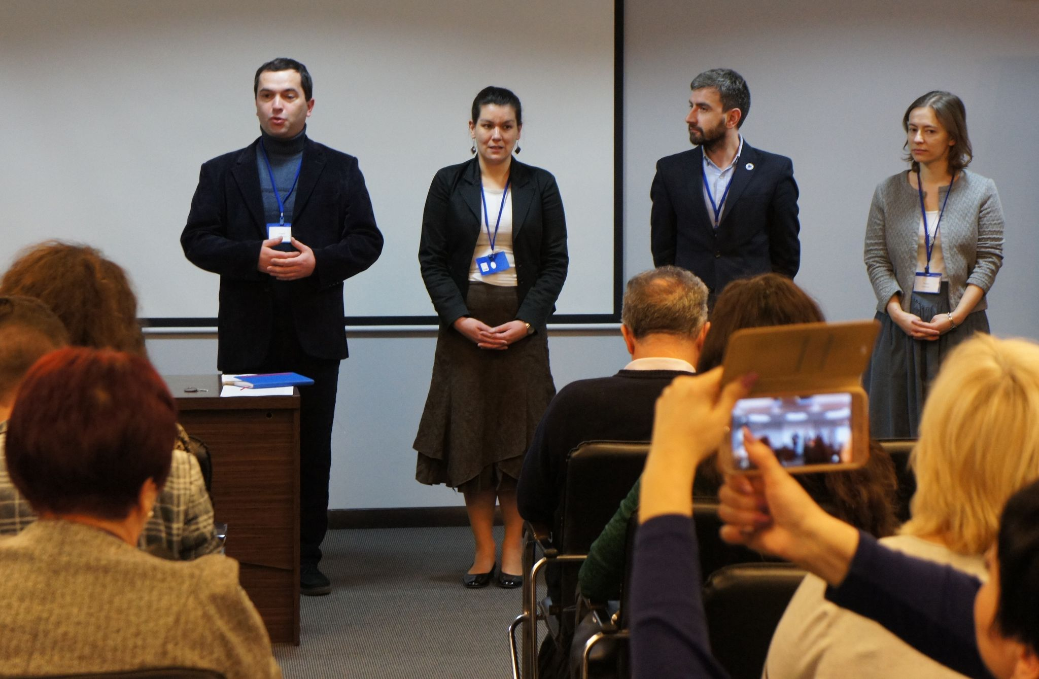 Forum podsumowujące projekt „Decentralizacja w praktyce – uczymy się od siebie nawzajem” zrealizowany przez Fundację Edukacja dla Demokracji w partnerstwie ze Stowarzyszeniem Nasze Podole oraz organizacją Towarzystwo Lwa (Lwów, 10 grudnia 2018).